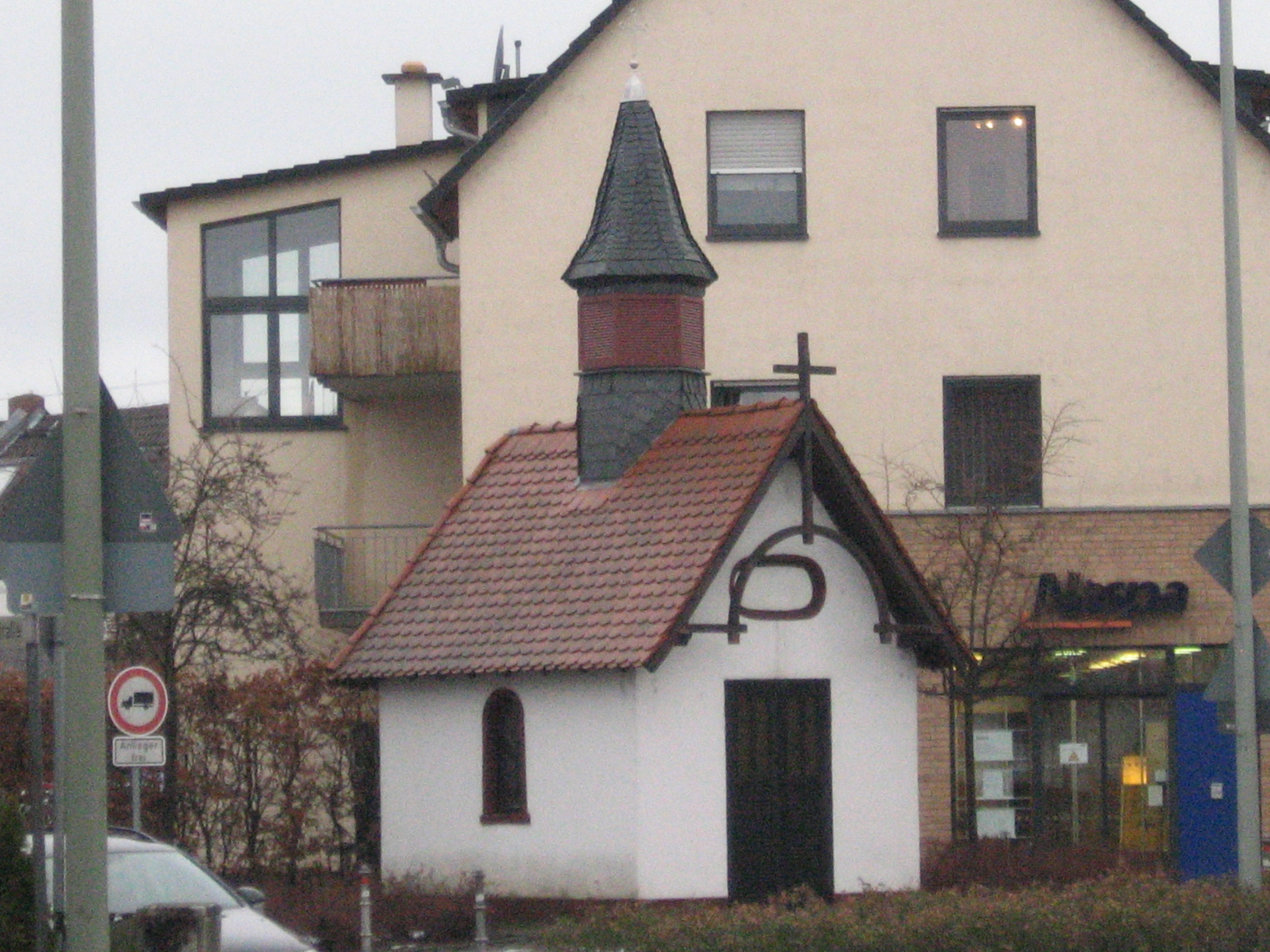 Kleine Kapelle Eddersheim, Bahnhofstrasse, Eke Weidrichstr - Google Maps - Google Earth